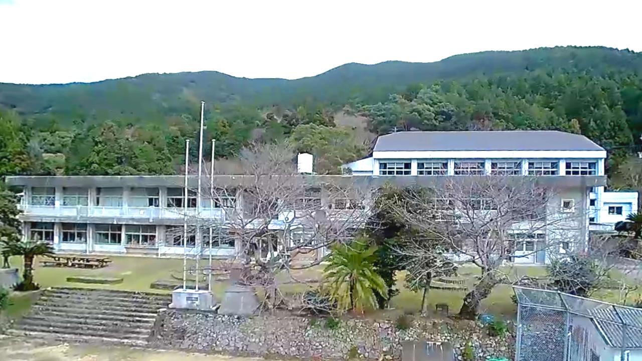 五島市立平成小学校、校舎全景。2019年廃校。